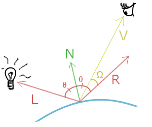 Dessins des différents vecteurs d'une réflexion selon la direction d'une lumière et d'un observateur, avec un vecteur normal.